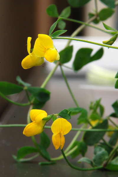 Lotus corniculatus var. japonicus, a model organism of Legume マメ科のモデル植物のひとつ、ミヤコグサの写真。